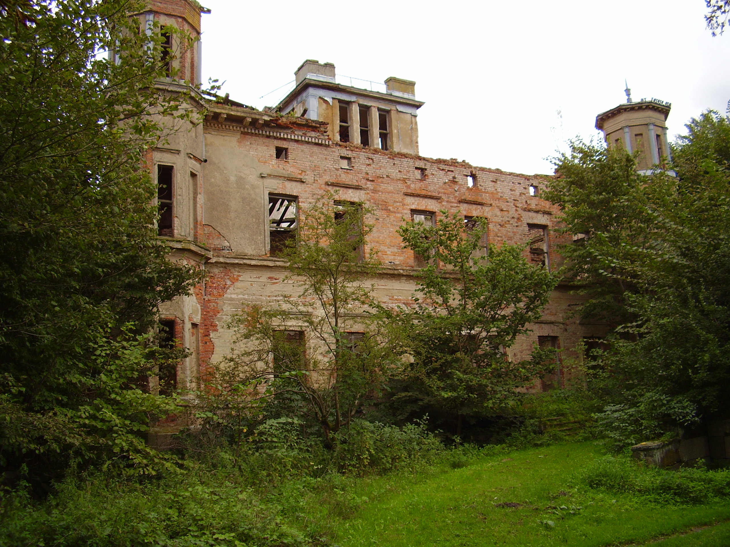 Lubiechowo, ruiny dworu, autor zdjęcia Uczeń; 10.10.2005 r.